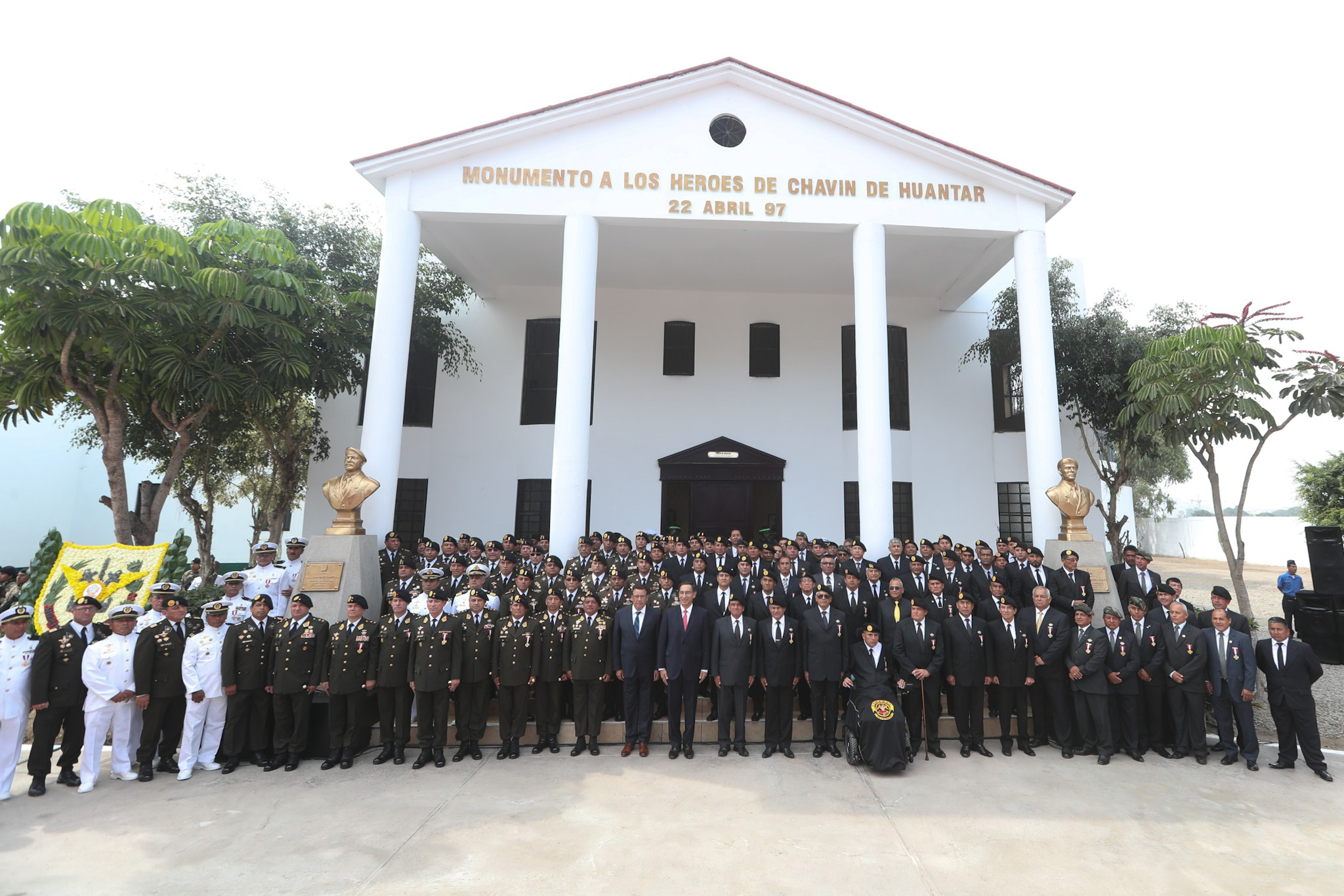 Presidente Martín Vizcarra durante conmemoración del 21 aniversario de la Operación Chavín de Huántar